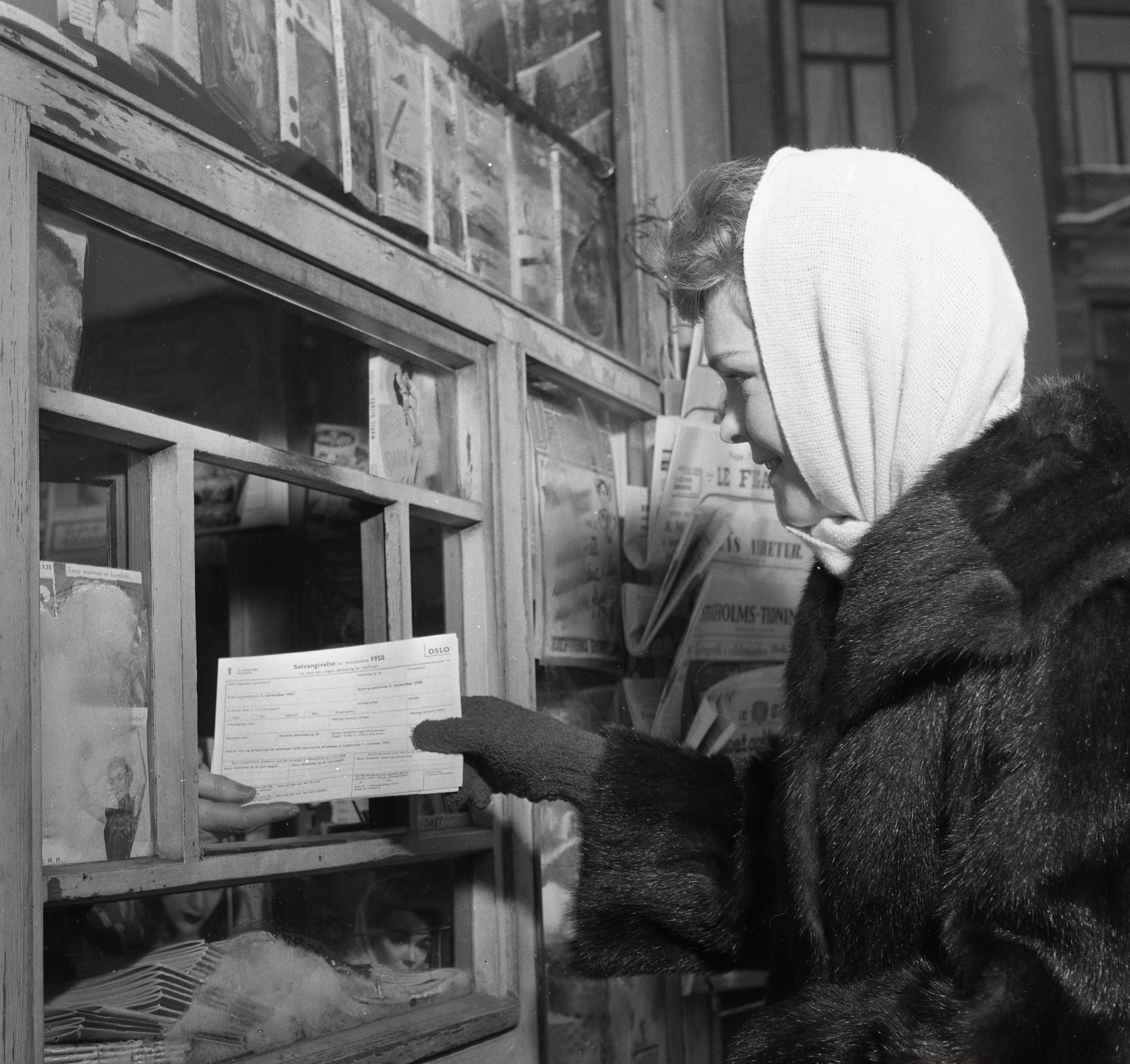 Bildet er hentet fra Arkivverket. Dame henter selvangivelsesskjema for Oslo (1958) i en kiosk. Arkivinstitusjon : Riksarkivet Arkivnavn : Billedbladet NÅ Sted : NORGE, Oslo, Oslo, Emneord: skatt, penger, selvangivelse, beskatning, oslo, rådhus, økonomi, kiosk, dame, skaut Avbildet: Ukjent